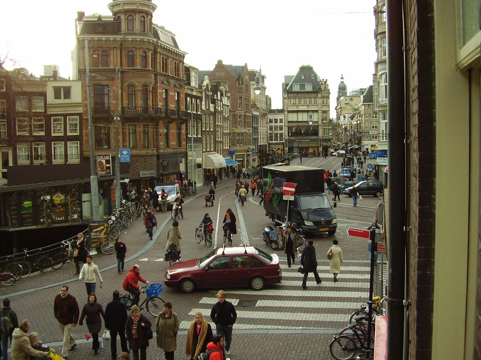 Hoek Singel/ Koningsplein Amsterdam. Op de hoek van Koningsplein en Singel in 1890-1891 opgetrokken WINKELPAND met KANTOREN en een CONCIERGEWONING naar een ontwerp in Neo-barok van Th.G. Schill en D.H. Haverkamp in opdracht van de directeuren der Verzekeringsbank 'Kosmos'. De winkel bevond zich op de beganegrond, de kantoren - van de verzekeringsbank 'Kosmos' zelf - waren gevestigd op de eerste en tweede verdieping en de conciergewoning bevond zich op de derde verdieping. Foto zelf genomen.